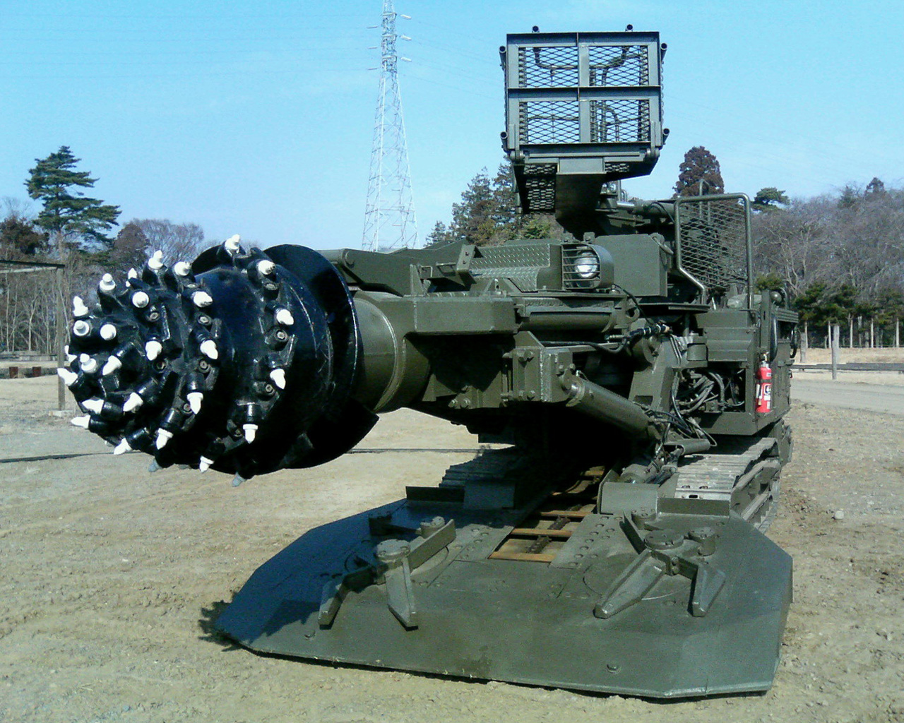 ○掘削機本体 [全長]約14.9m [全幅]約2.8m [全高]約1.8～3.5m [全備重量]約30t [対象土質]普通土、軟岩 [掘削高]約3～5m [掘削幅]約3～6m [掘削断面]約29平方メートル [平均掘削能力]約30平方メートル/h [製作]三井三池製作所 坑道式構築物を掘削するために使用する器材である。掘削機本体，支保工作装置，ずり搬出装置，給電装置，地質調査器材および環境保全器材等から構成され，平成3年度から装備化された器材である。